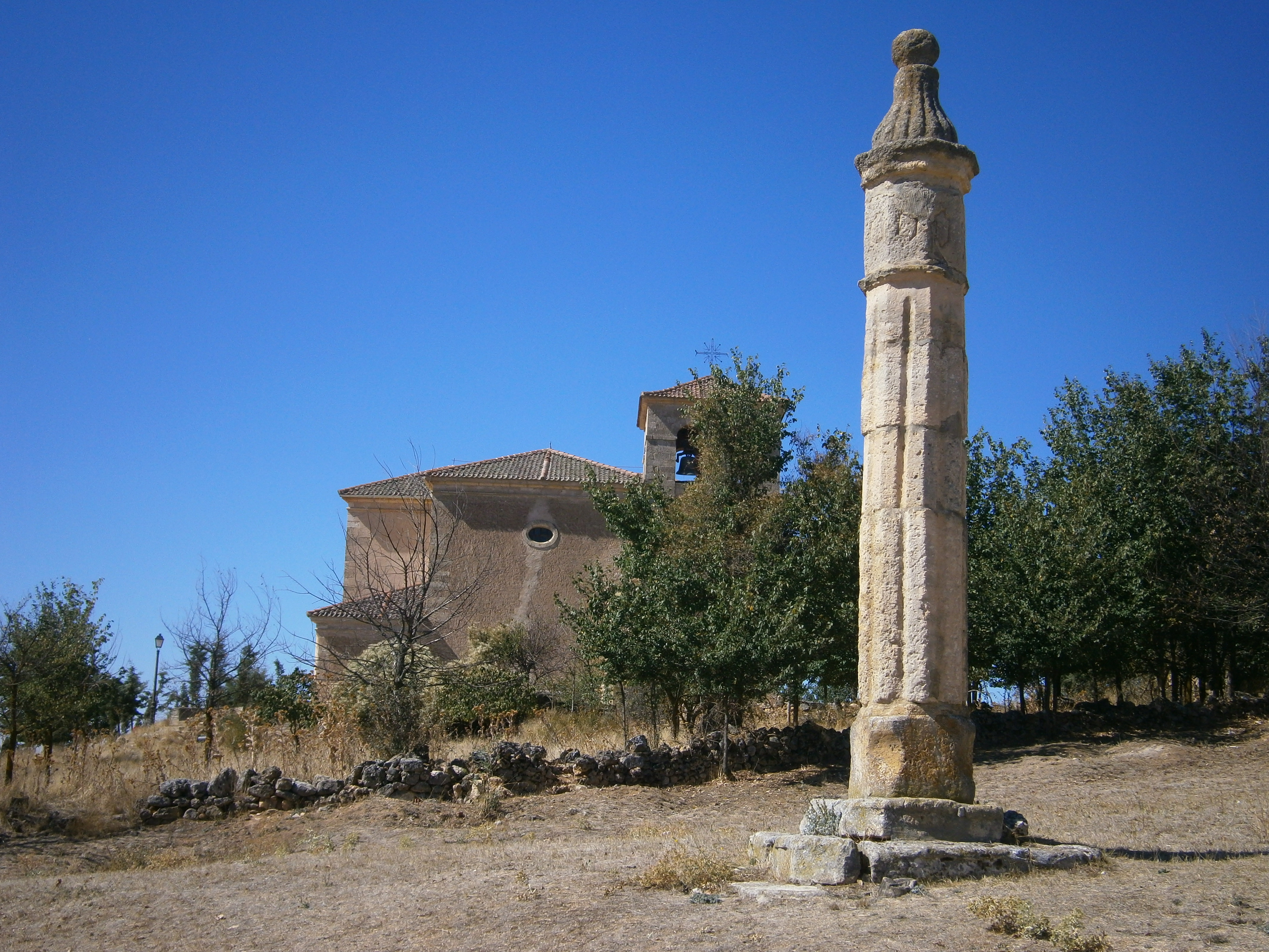 Rollo ante la Iglesia de San Vitores en Grajera